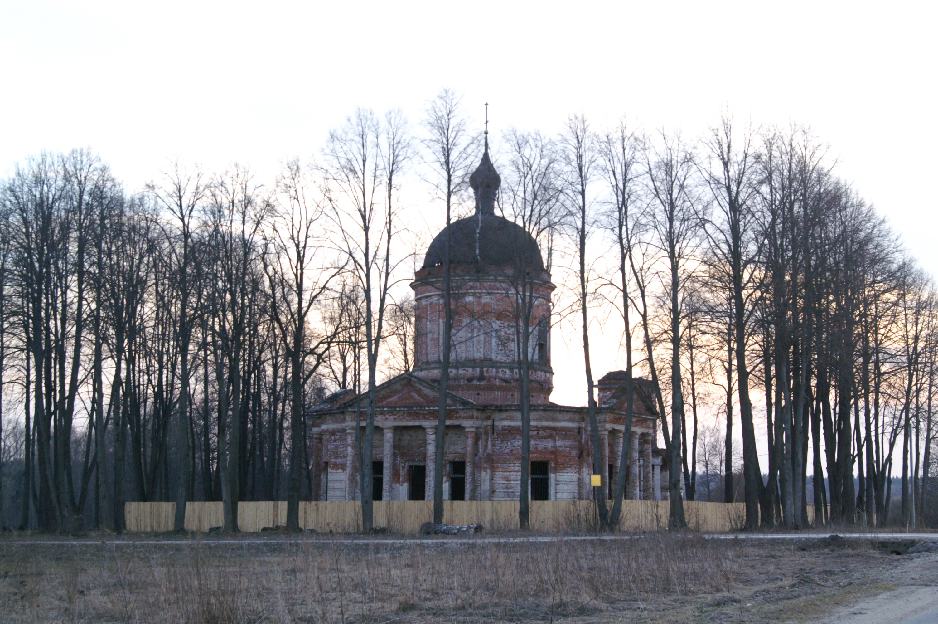 Храм Рождества Богородицы в с. Талеж Чеховского р-на Московской области, построенный в 1796 г. Фотография сделана в апреле 2007 года - во время начала восстановления храма. Вид с востока